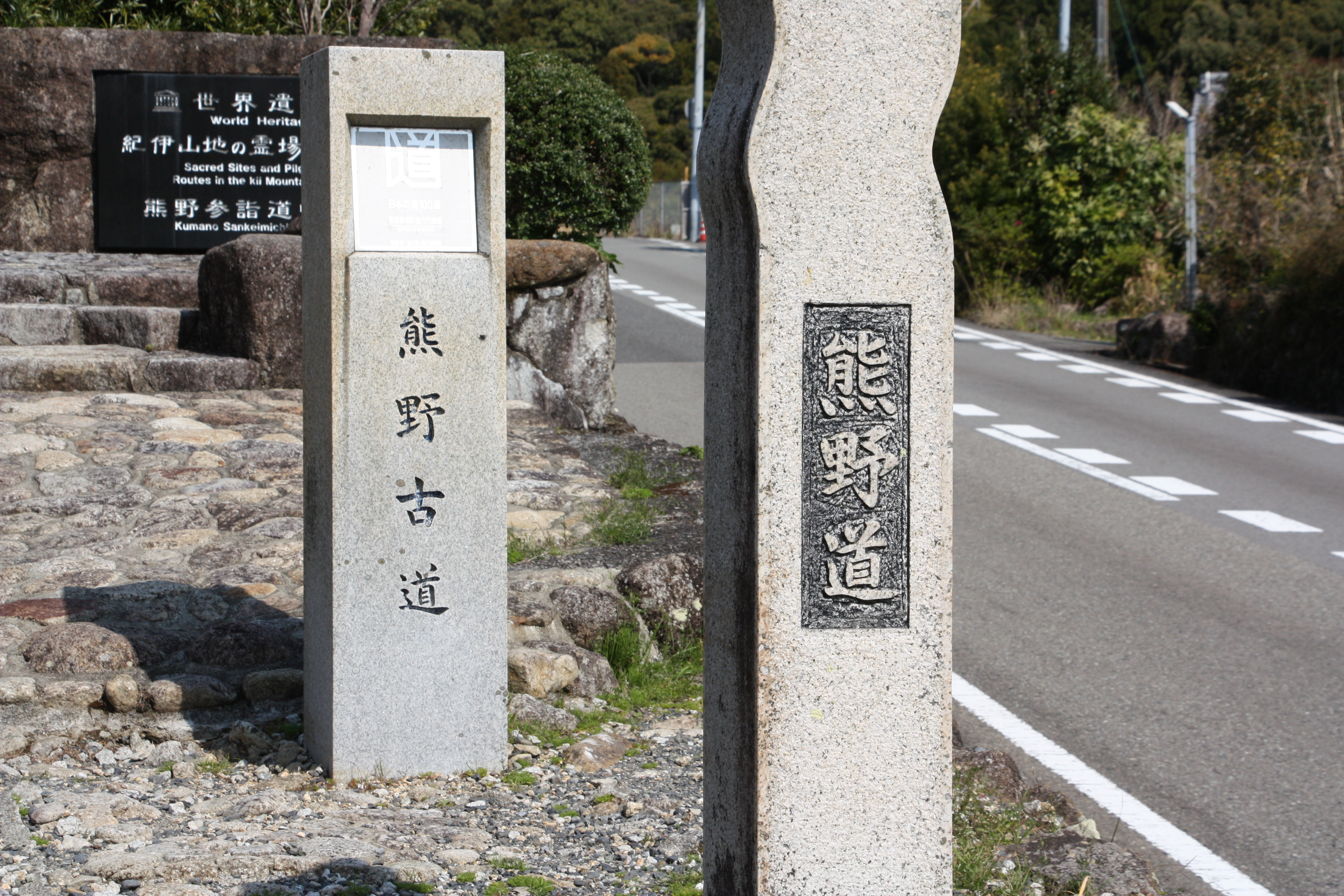 那智勝浦町の大門坂入口で撮影